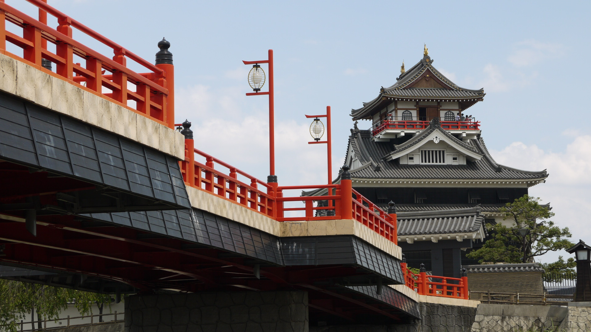 Kiyosu Castle 清洲城9